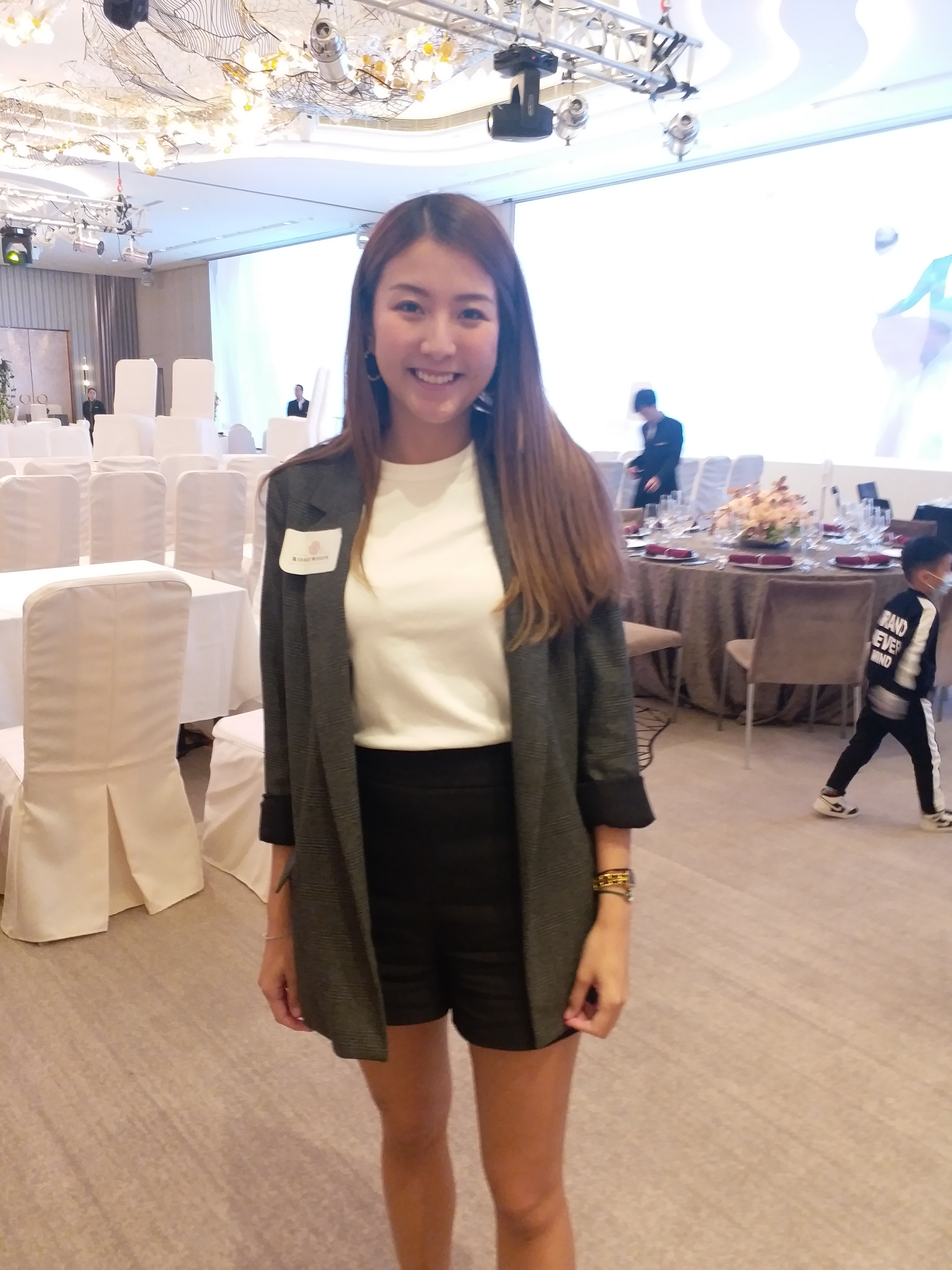 2019年11月10日(荃灣如心海景酒店暨會議中心)